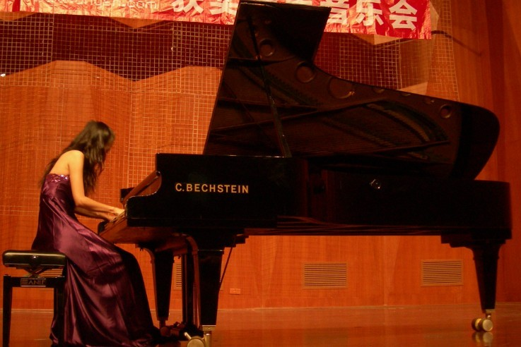 鼓浪屿上的钢琴音乐会 Bân-lâm-gú: Kóo-lōng-sū siōng ê kǹg-khîm im-ga̍k-huē. 鼓浪嶼上的鋼琴音樂會。